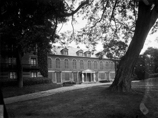 Façade sur jardin de la maison de Châteaubriand dans le domaine de la Vallée-aux-Loups (Val d'Aulnay, Hauts-de-Seine, France)